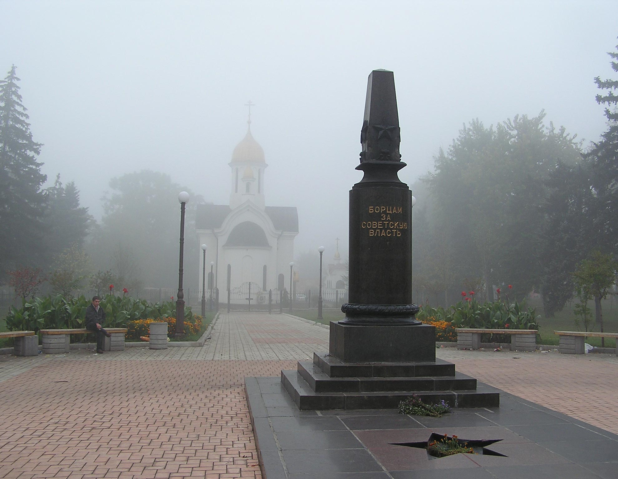 Сквер павших коммунаров в Донецке